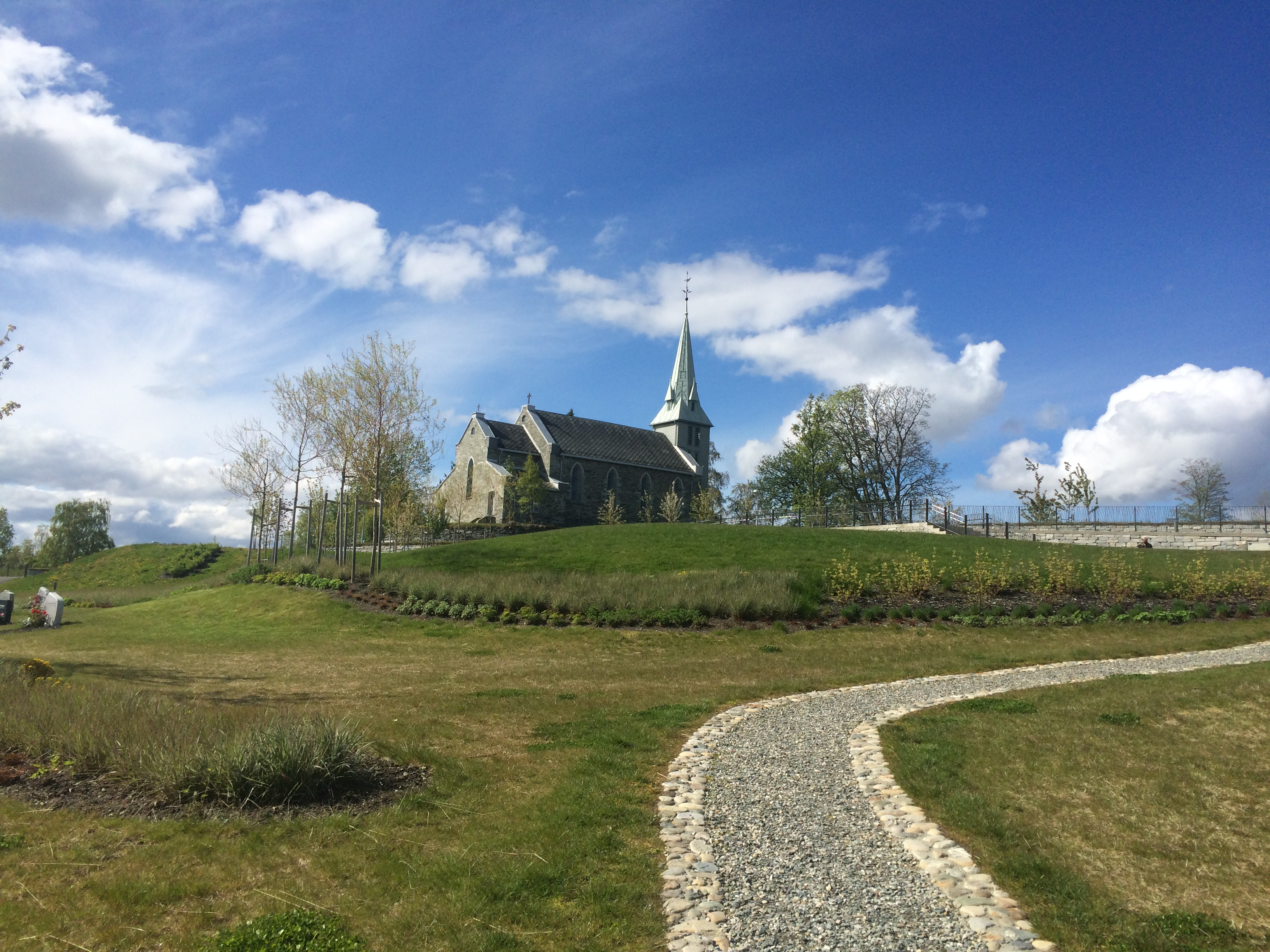 Havstein kirke fra nordøst, fra det nyanlagte området som fikk Trondheim kommunes byggeskikkpris i 2015